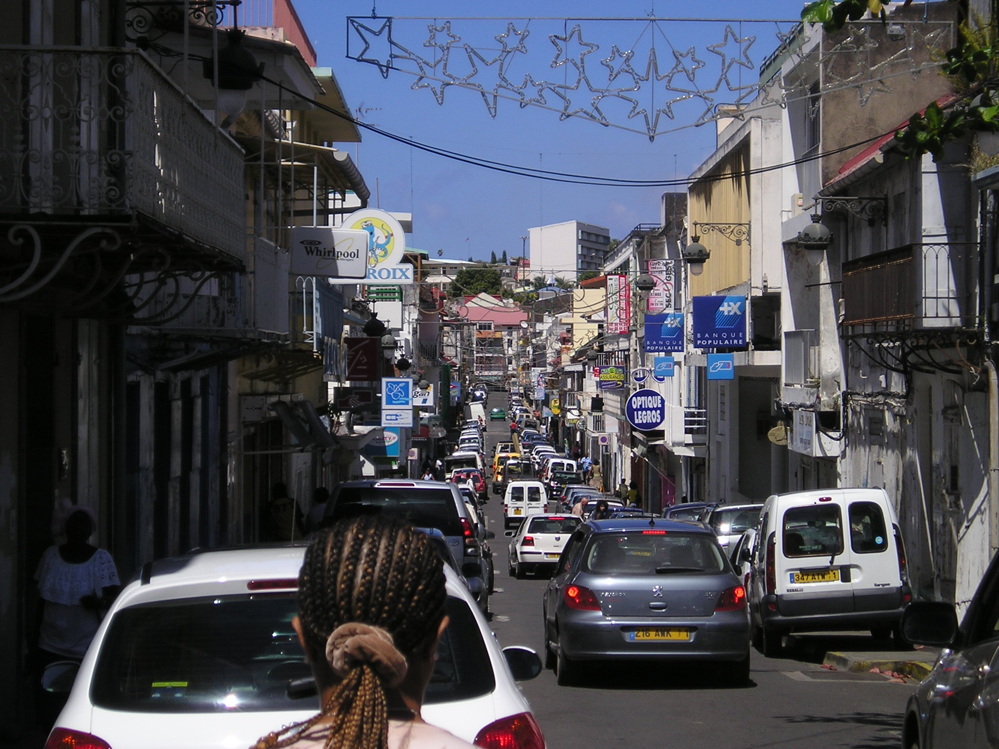 Місто Бас-Тер, Гваделупа